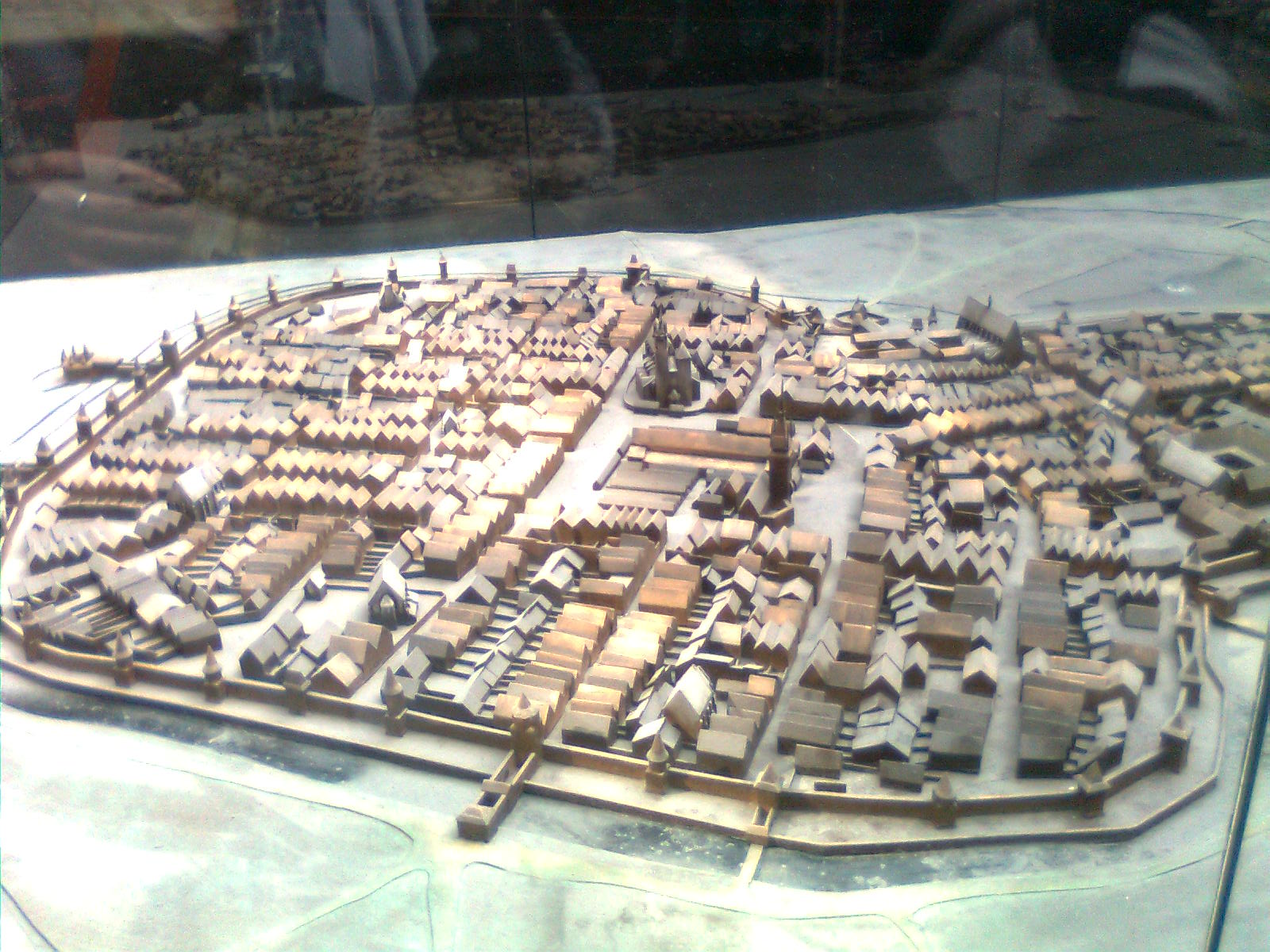 Makieta średniowiecznego Krakowa. English | polski | +/−